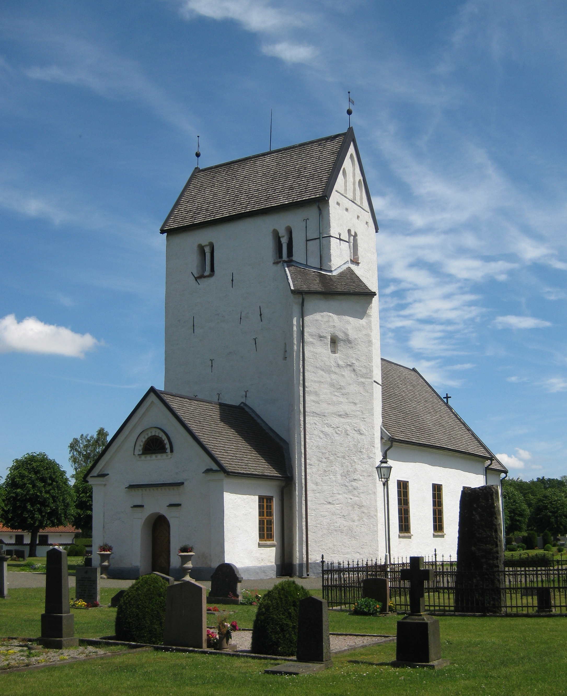 Everöds kyrka i Kristianstads kommun